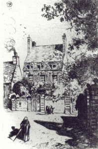 Félix Buhot hotel Dorleans Valognes